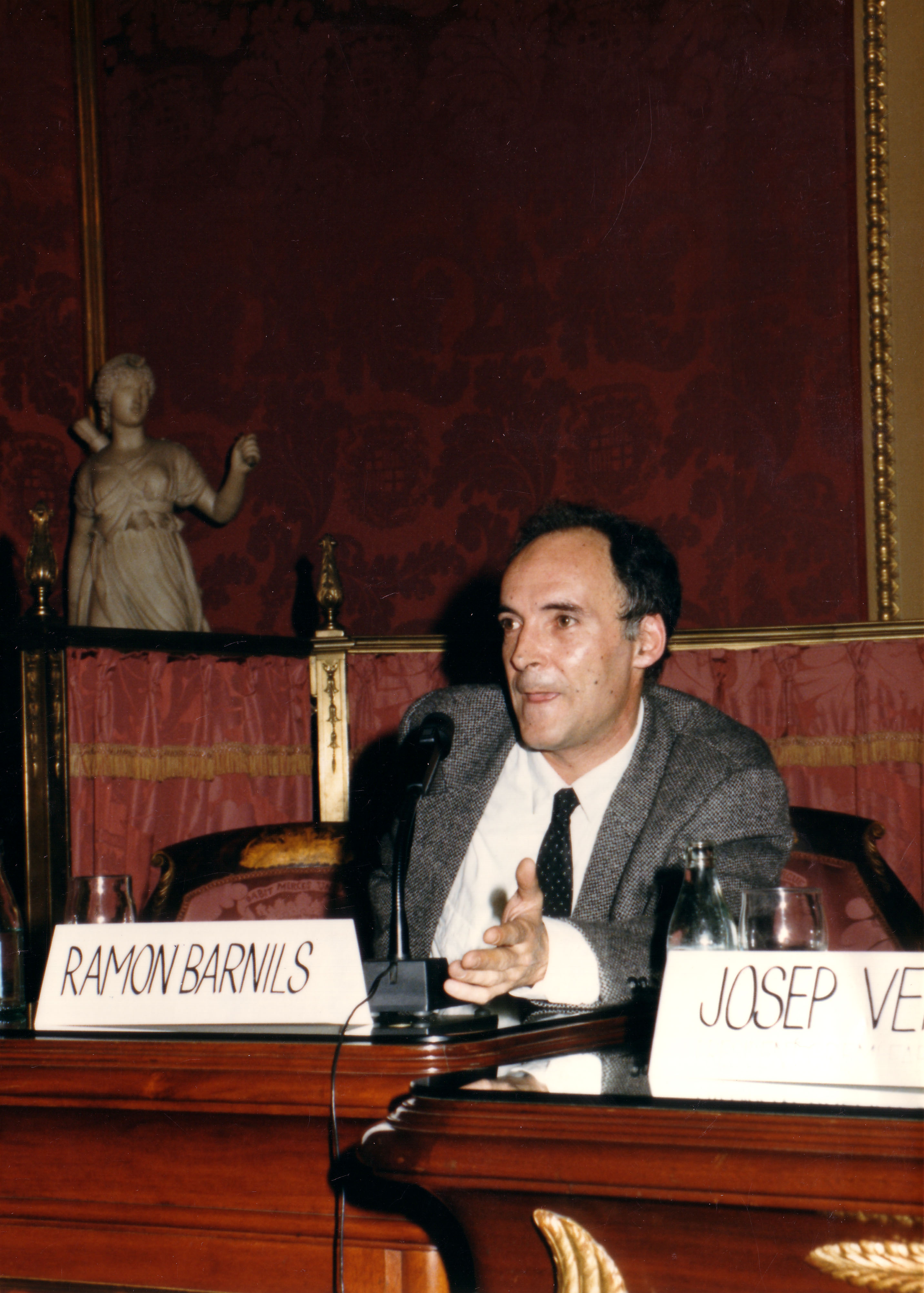 Ramon Barnils a la Cambra de Comerç de Barcelona, maig 1988